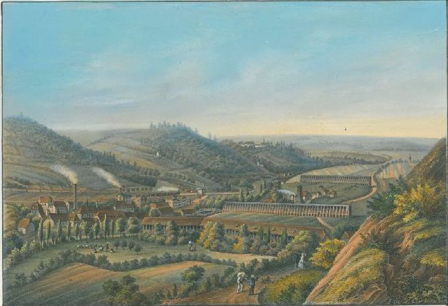 Saline Neu-Sulza mit Dorfsulza und Bergsulza im Hintergrund